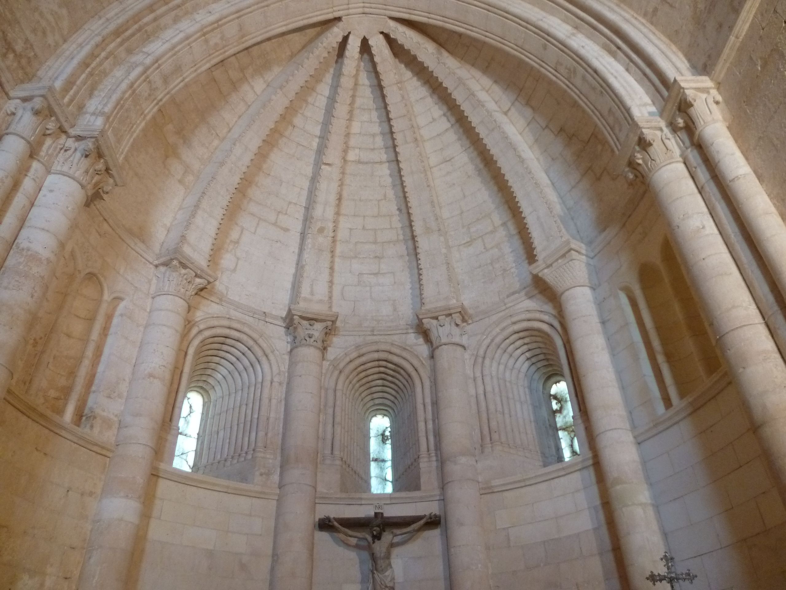 Este sistema de abovedamiento absidal nos habla de una fecha tardía en su construcción o de un taller muy vanguardista, puesto que se trata de una solución que algunos denominan ya incluso como "protogótica" y que se emplea en iglesias tardías de finales del siglo XII o comienzos del XIII.